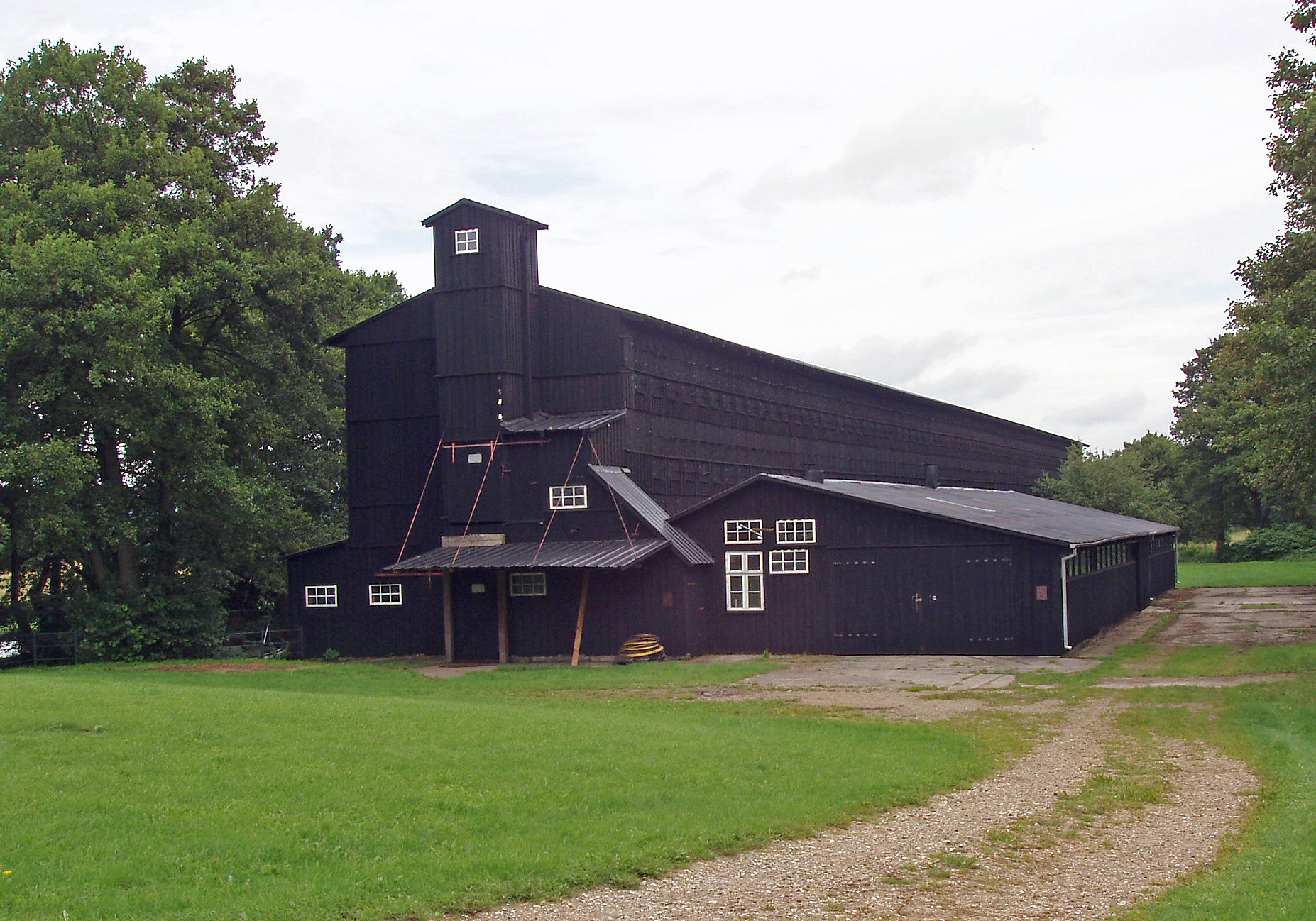 Tørrelade ved Klostermølle ved Mossø, Jutland, Denmark.